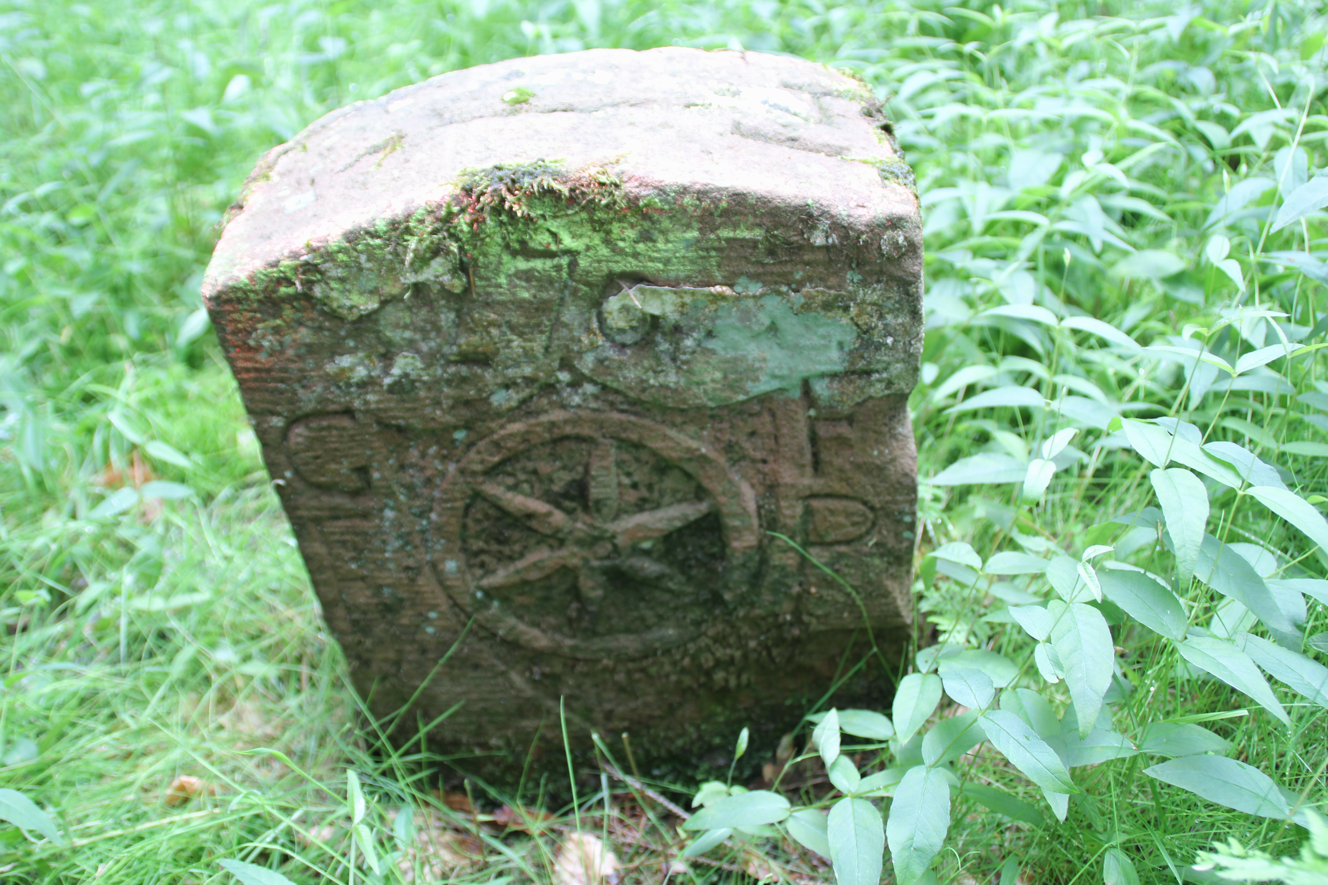 Grenzstein zwischen Geiselbacher Forst und Huckelheimer Wald